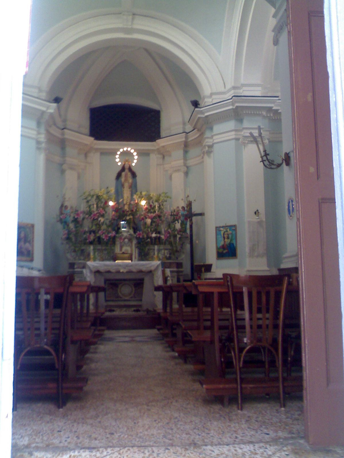 Interno della chiesina di Sant'Anna a porta Capuana (Napoli)